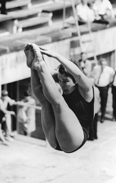 Tamara Pogoshewa Zentralbild Kluge wen-ne 29.7.1968 Leipzig: DDR-Wasserspringer siegten im Länderkampf gegen die UdSSR mit 47:41 Punkten Tamara Pogoshewa (SU) siegte im Kunstspringen der Frauen mit 455,20 Punkten.